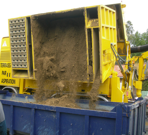 Opération de vidage de la benne de l'excavatrice-aspiratrice